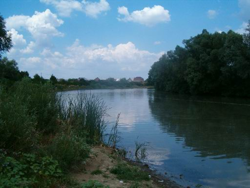 Río Afips, afluente del Kubán, krai de Krasnodar y república de Adiguesia, Rusia.